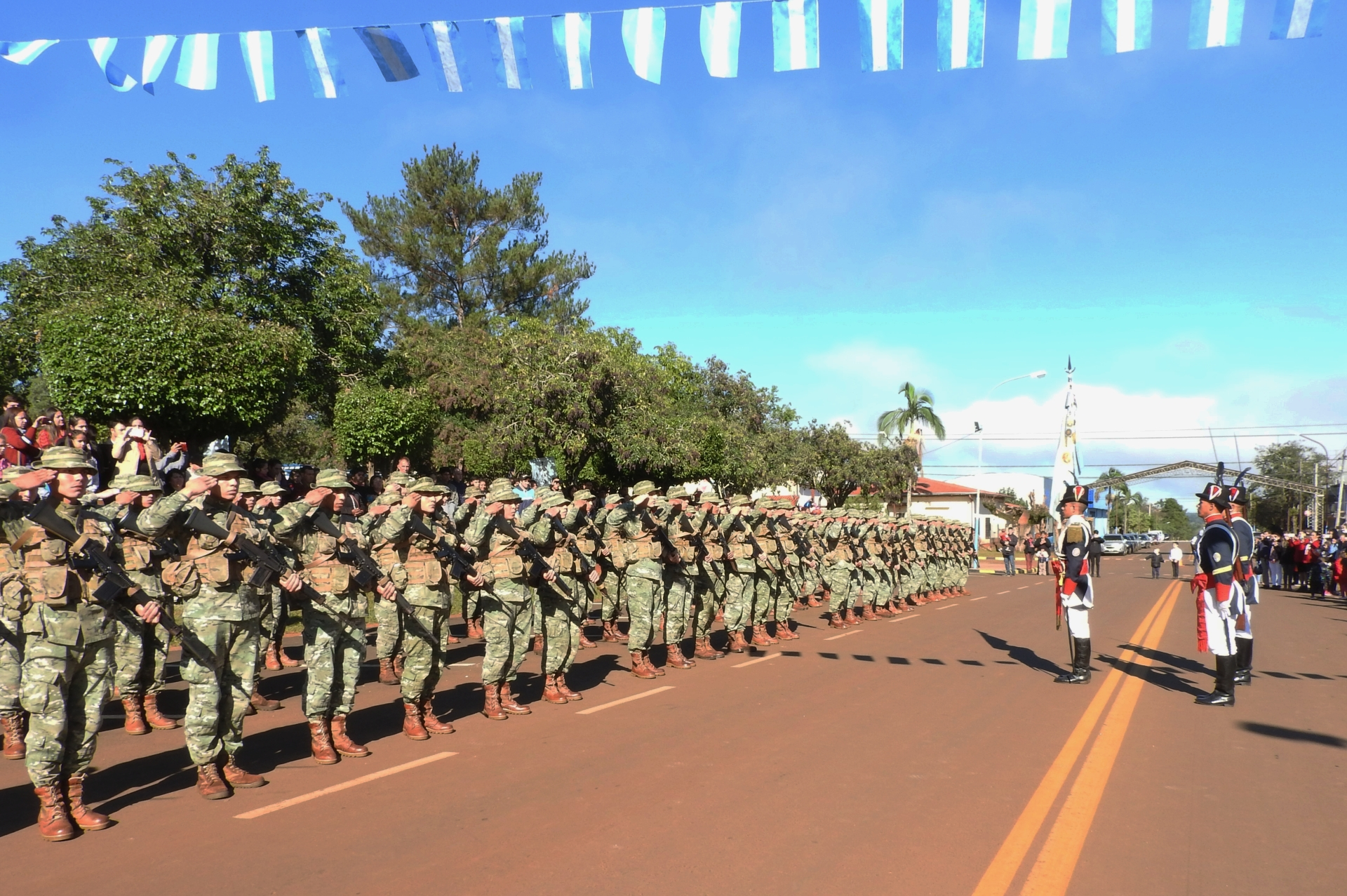 Regimiento de Infantería de Monte 9 (RIMte 9) del Ejército Argentino en el Día de la Bandera